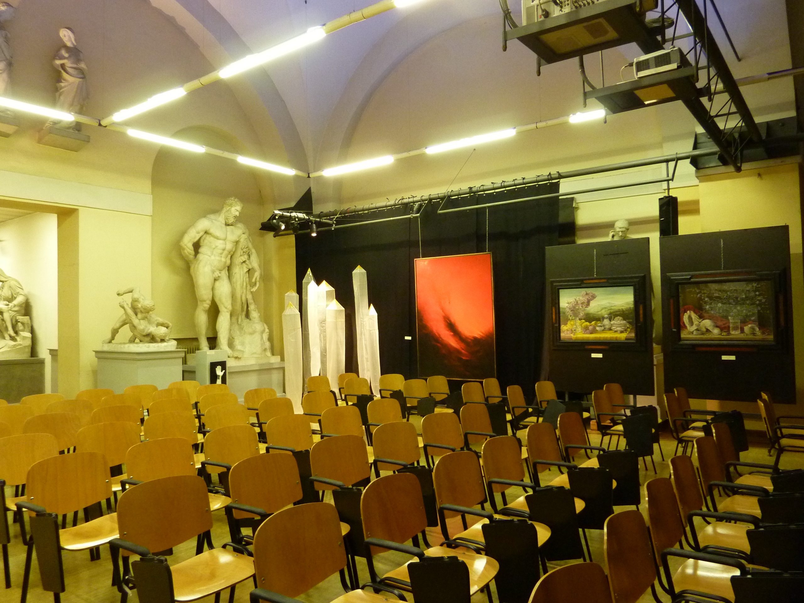 L'Aula Magna del Liceo artistico Paolo Toschi a Parma.